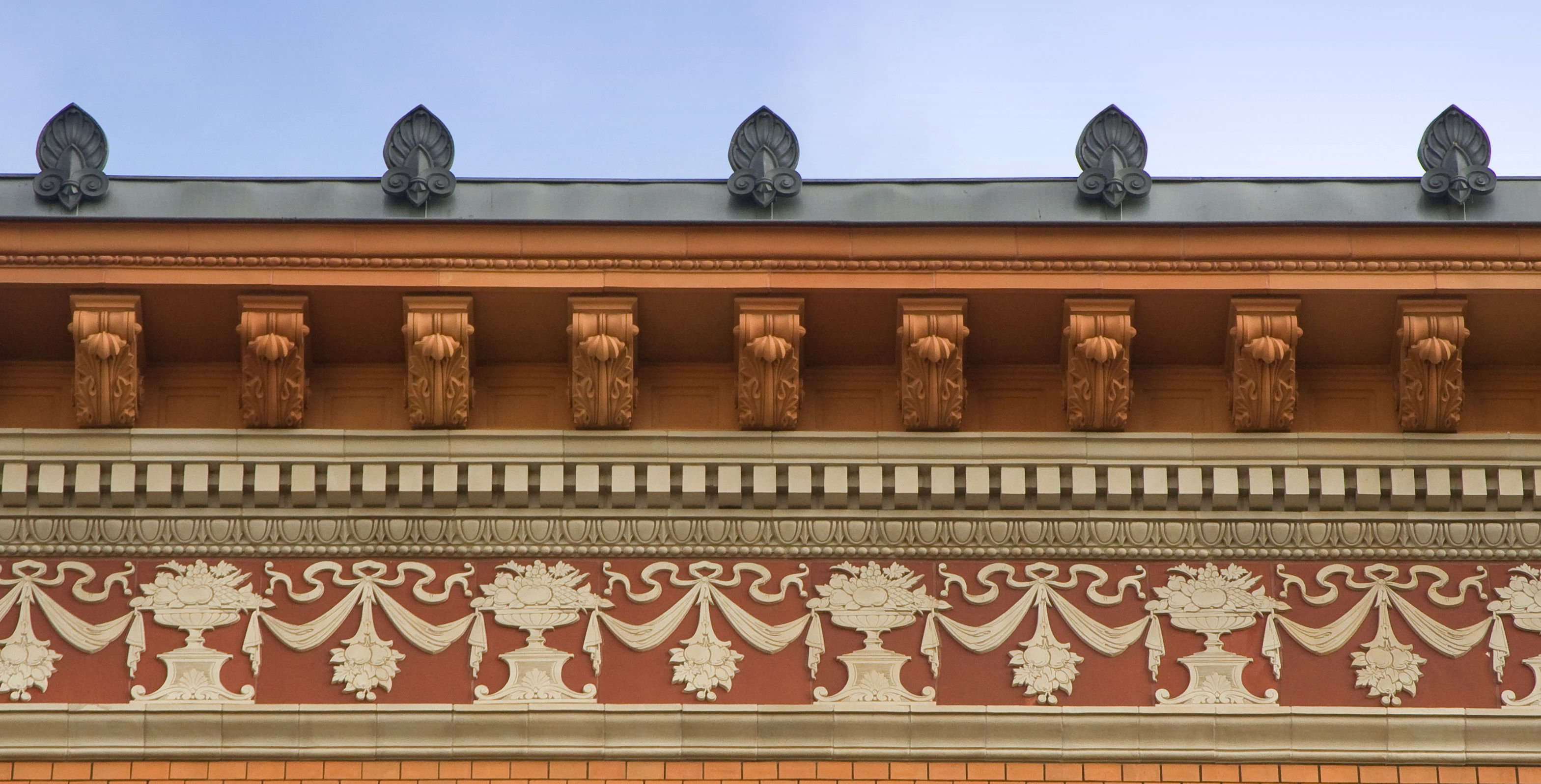 Berlin - Markthalle IV, ehemaliges Vordergebäude an der Dorotheenstraße, Dachgesims